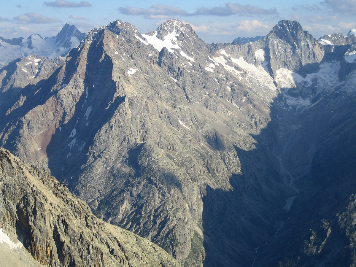 Au soleil de gauche à droite : - Grande Aiguille de la Bérarde - Cime de l'Encoula - Cime de Clot Chatel - Pointe du Vallon des Étages Le couloir N de la Grande Aiguille de la Bérarde, ainsi que ses arêtes NW et NE sont bien visibles. Photo prise depuis l'Aiguille Centrale du Soreiller à 19h10.